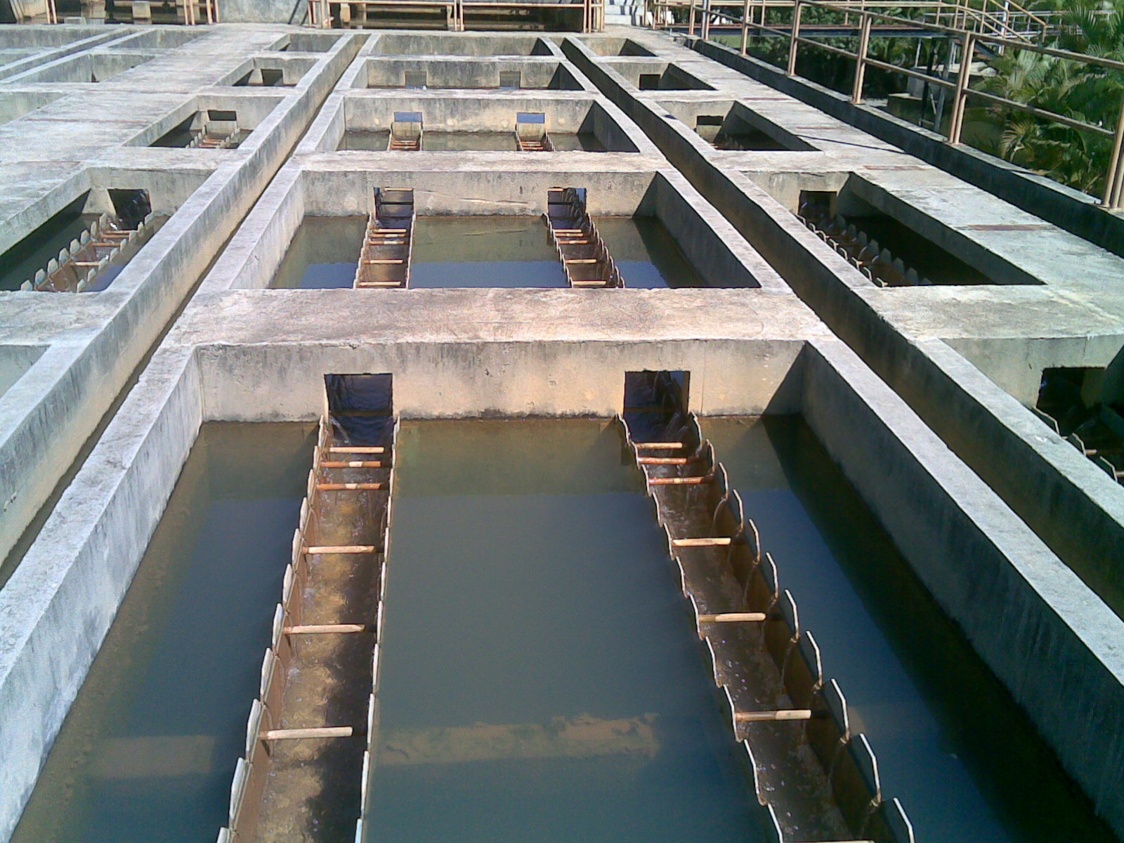 Etapa de decantação em uma estação de tratamento de água.